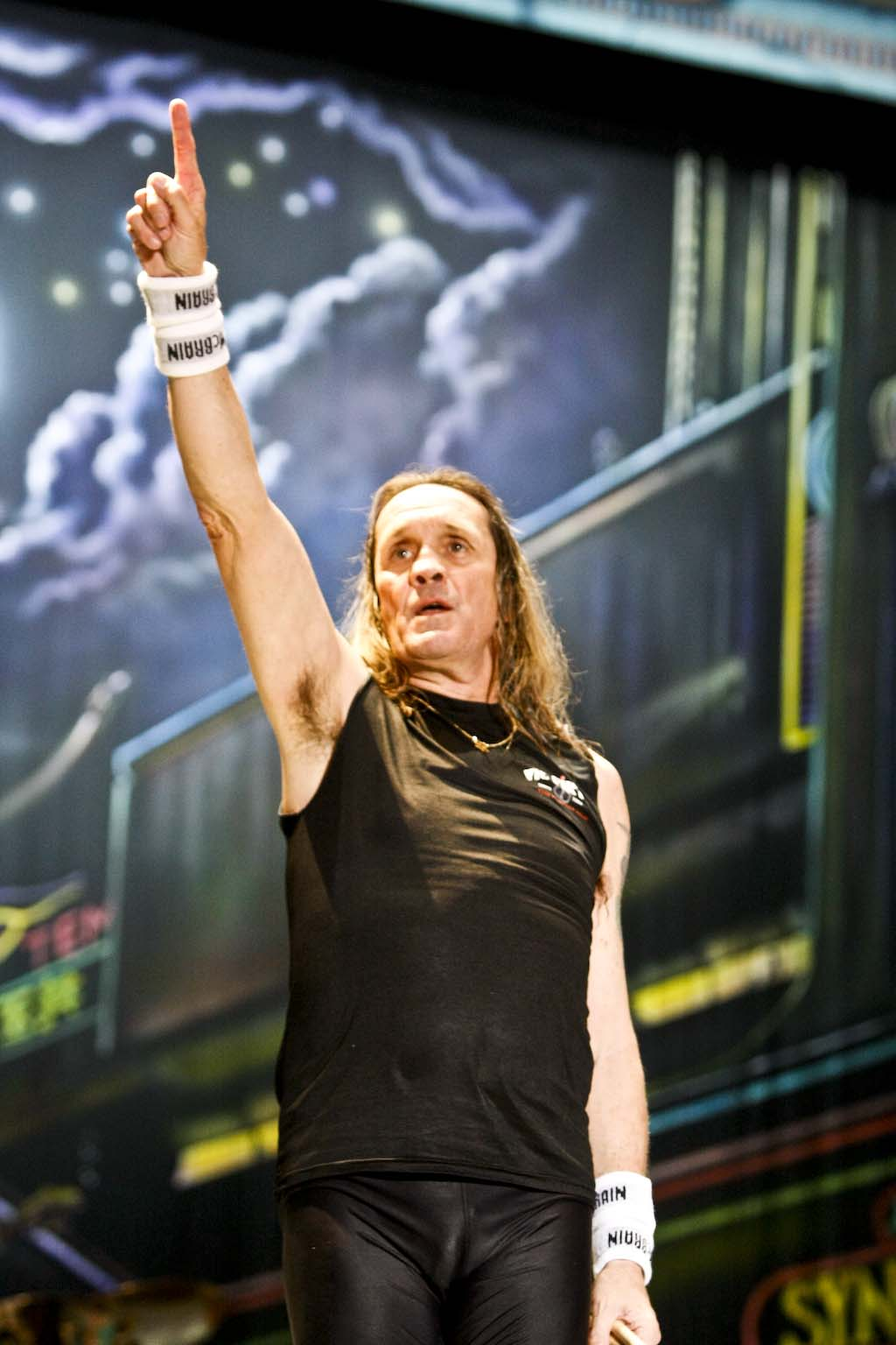 Nicko McBrain